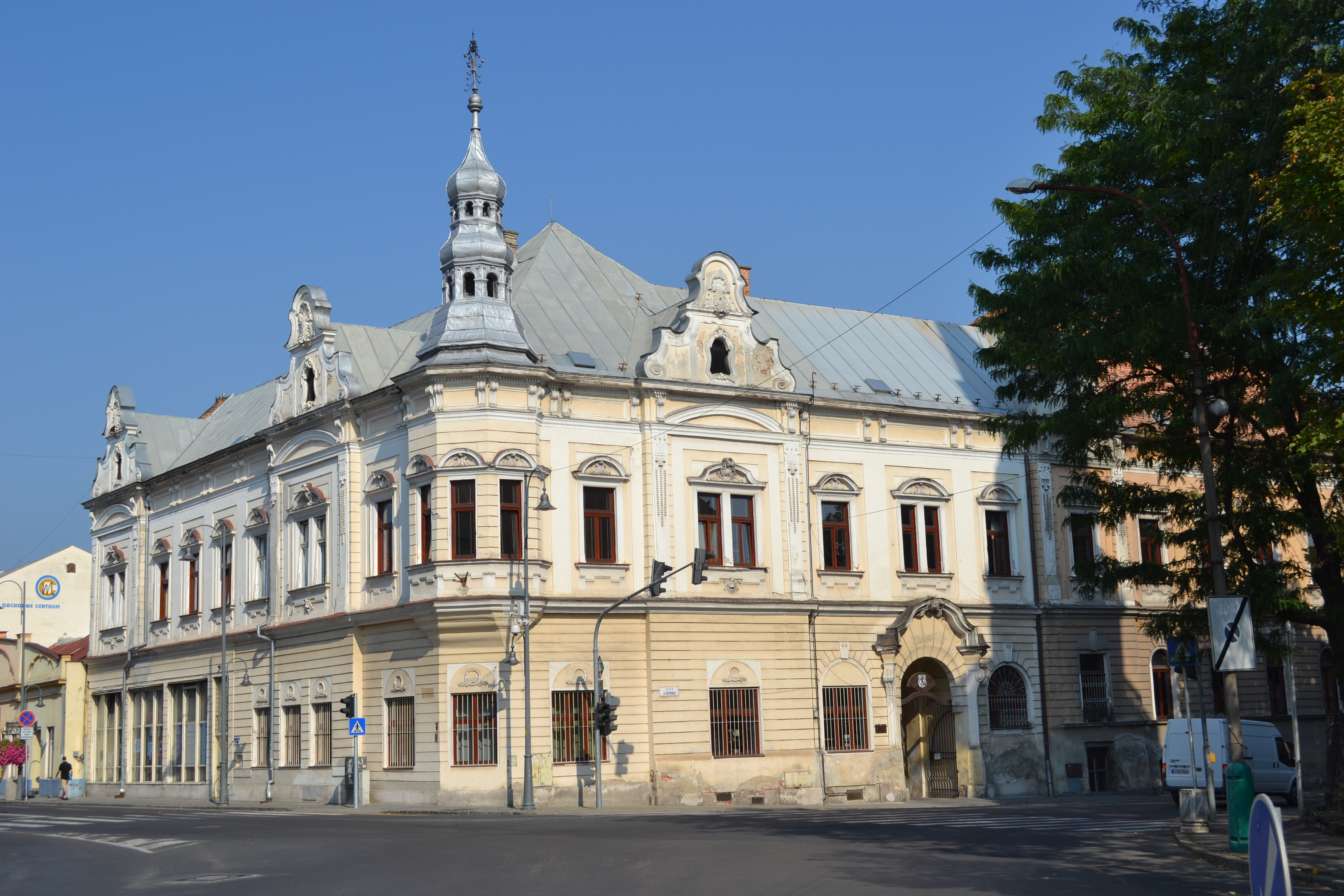 Bibliothek Novohrad in Lučenec, J. Karmán Straße 2 (Kulturdenkmal)